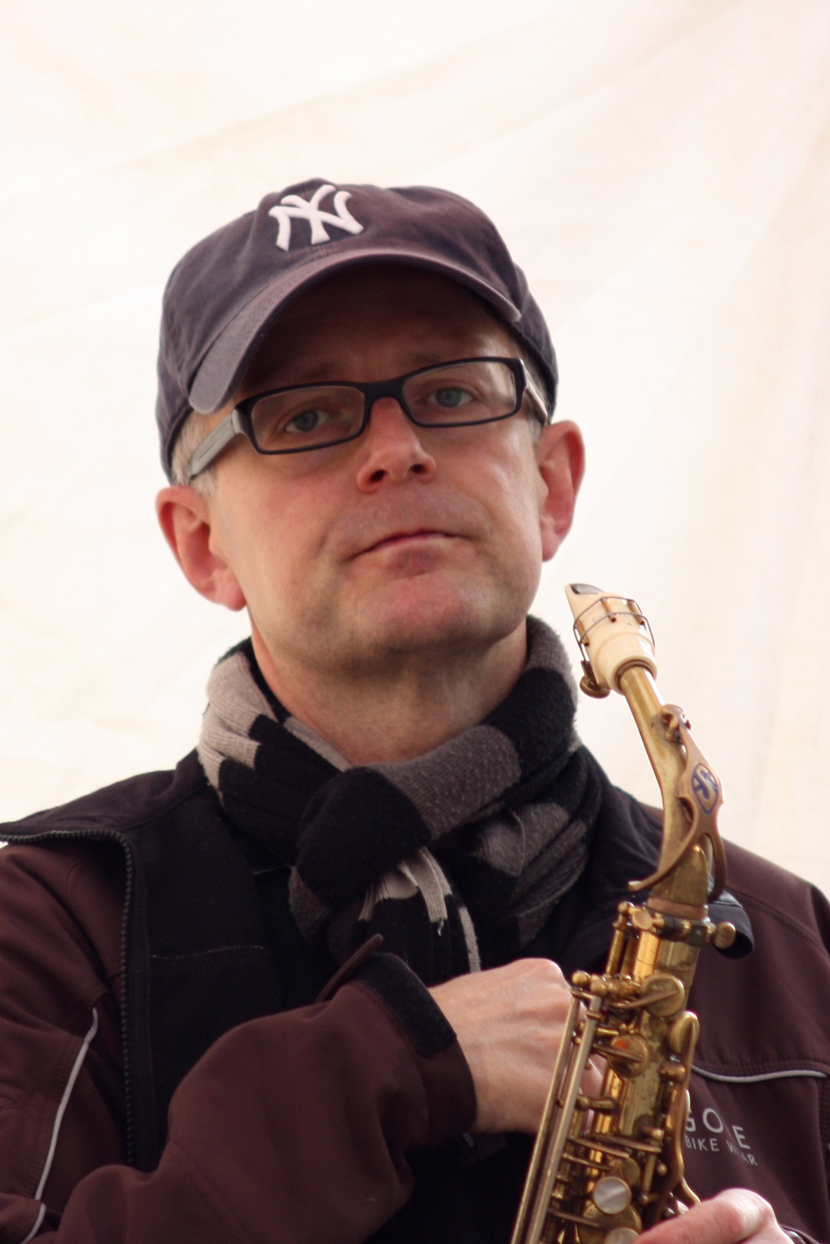 Wiesbadener Stadtfest 2013: Ulli Jünemann